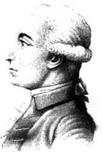 Louis-Claude de Saint-Martin, dit le Philosophe Inconnu.